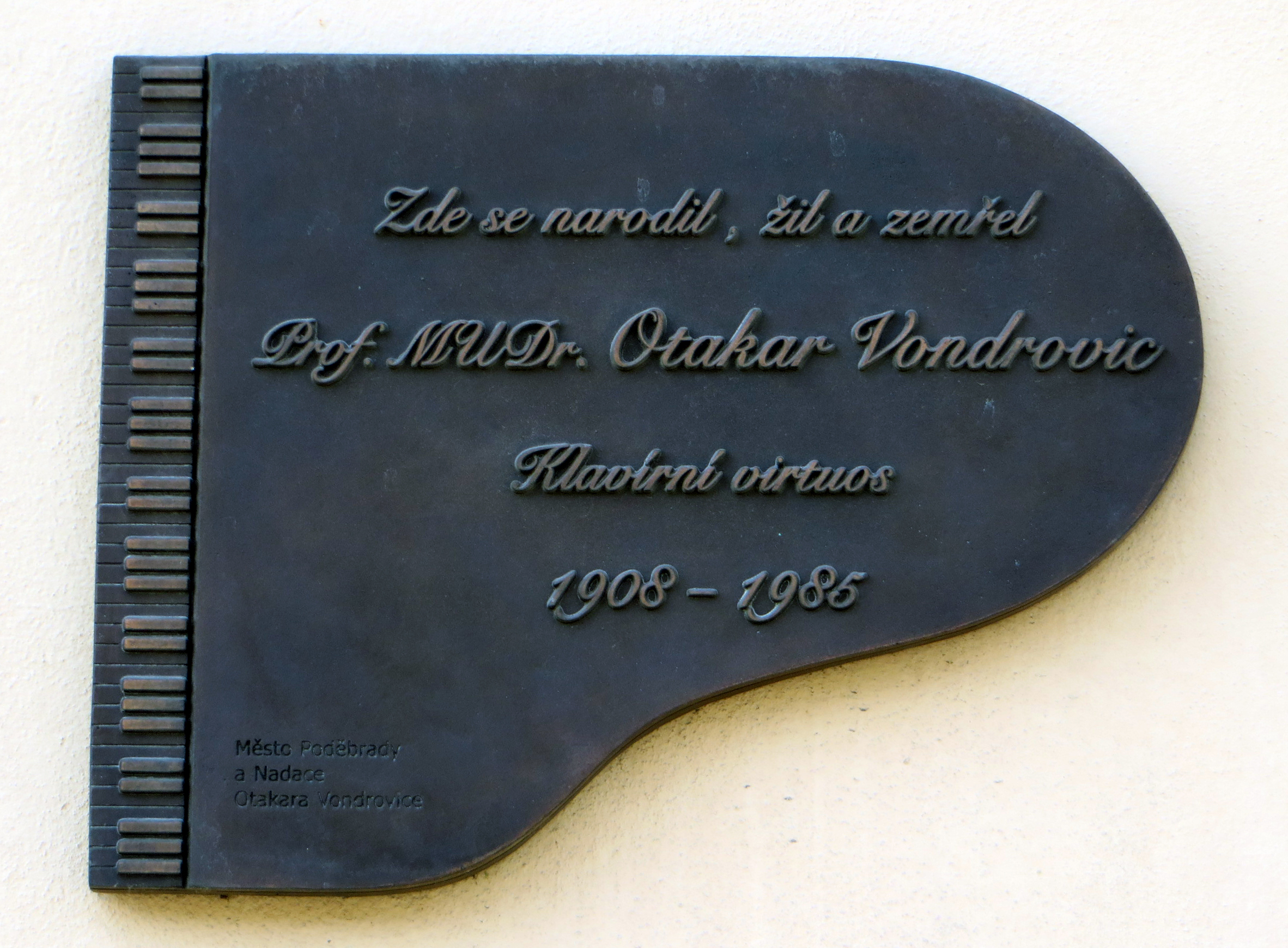 Pamětní deska Otakara Vondrovice. Lázeňská 10/1. GPS: 50.1438647N, 15.1221656E